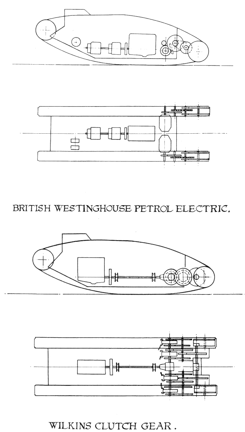 Digitale reproductie foto van de oorspronkelijke vergelijkingstekening voor transmissieprojecten.